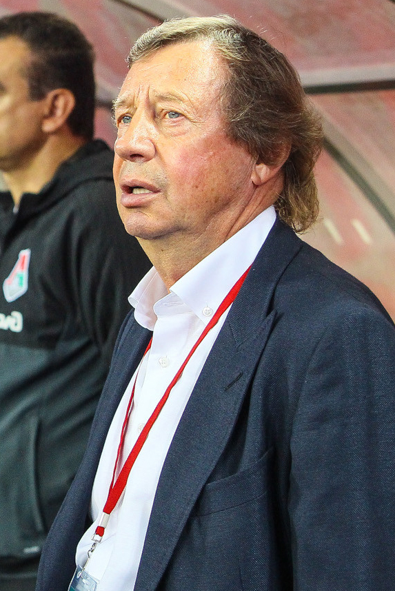 «Спартак» - «Локомотив»